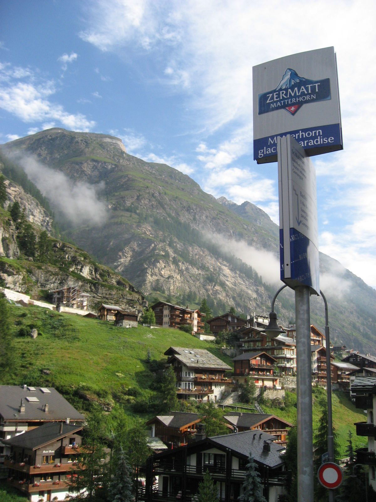 瑞士策馬特，攝於2007-07-21